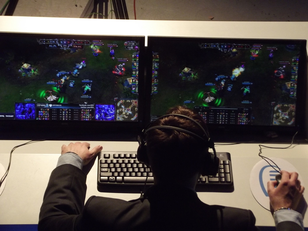 Zdjęcie zrobione podczas Intel Extreme Masters 2013 w katowickim Spodku.